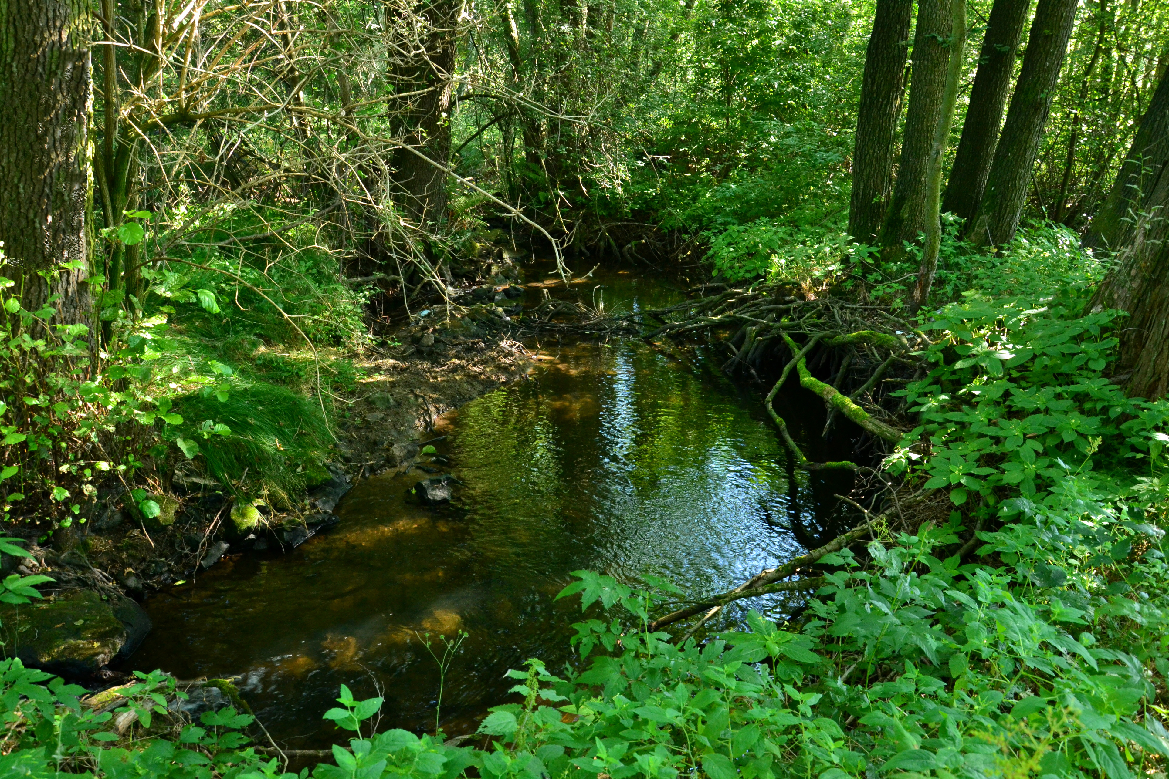 PP Bedřichovský potok